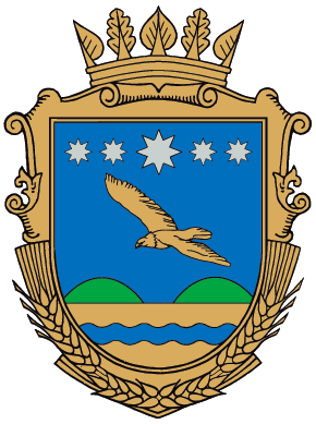 Герб Великобілозерського району